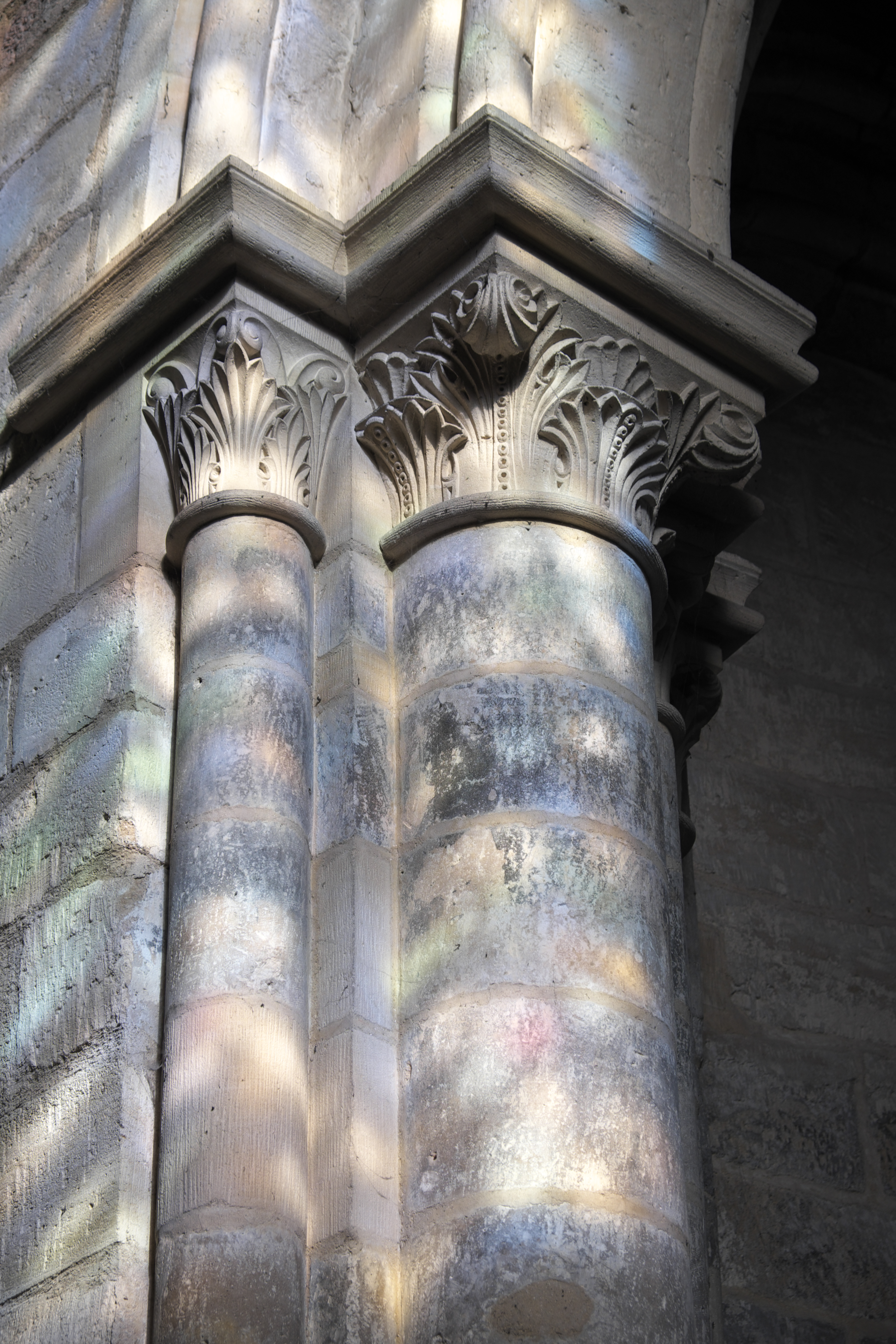 Katholische Pfarrkirche Notre-Dame de l’Assomption in Champagne-sur-Oise (Département Val-d’Oise) in der Region Île-de-France (Frankreich), Kapitelle